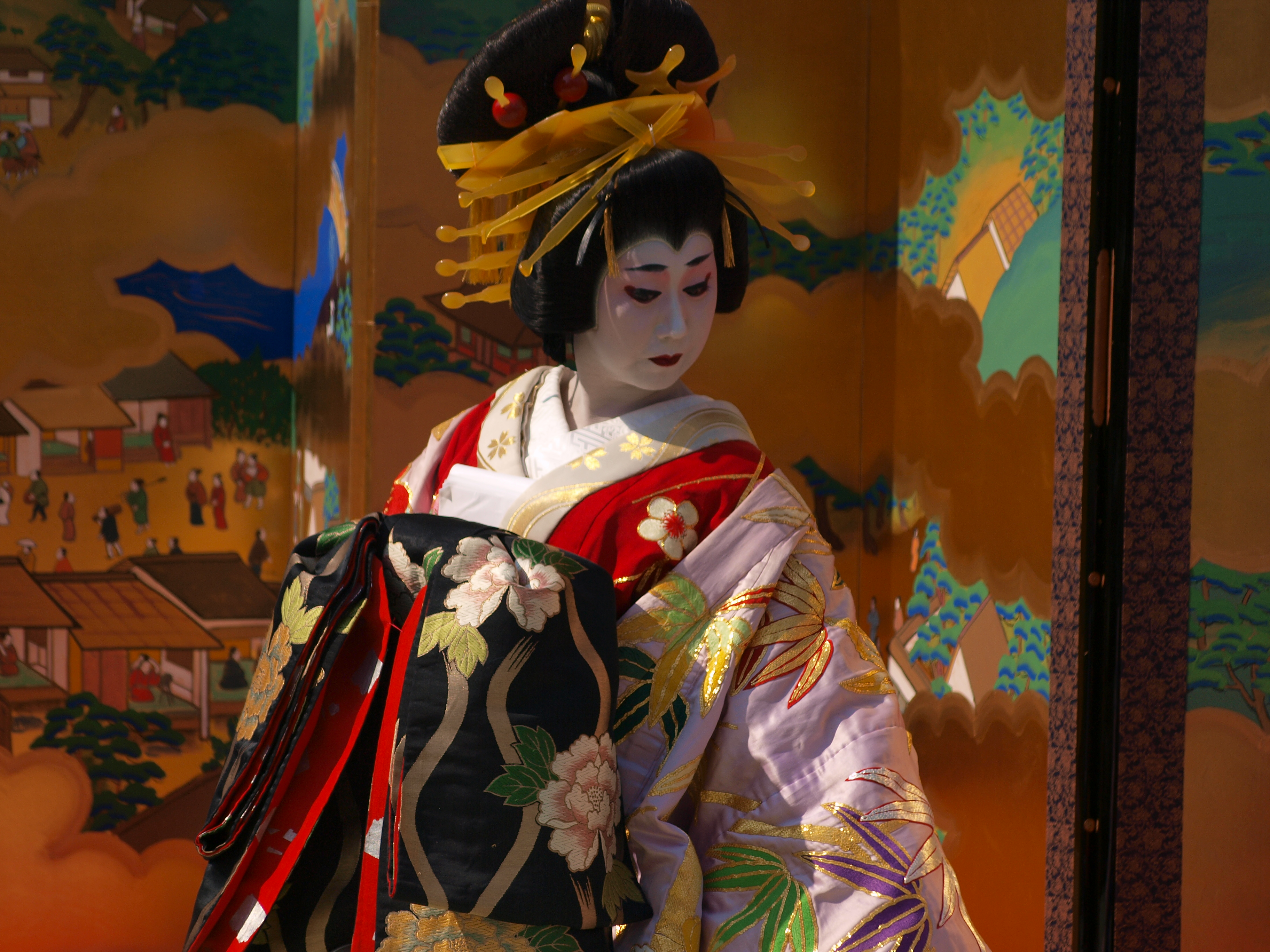 Oiran at Asakusa